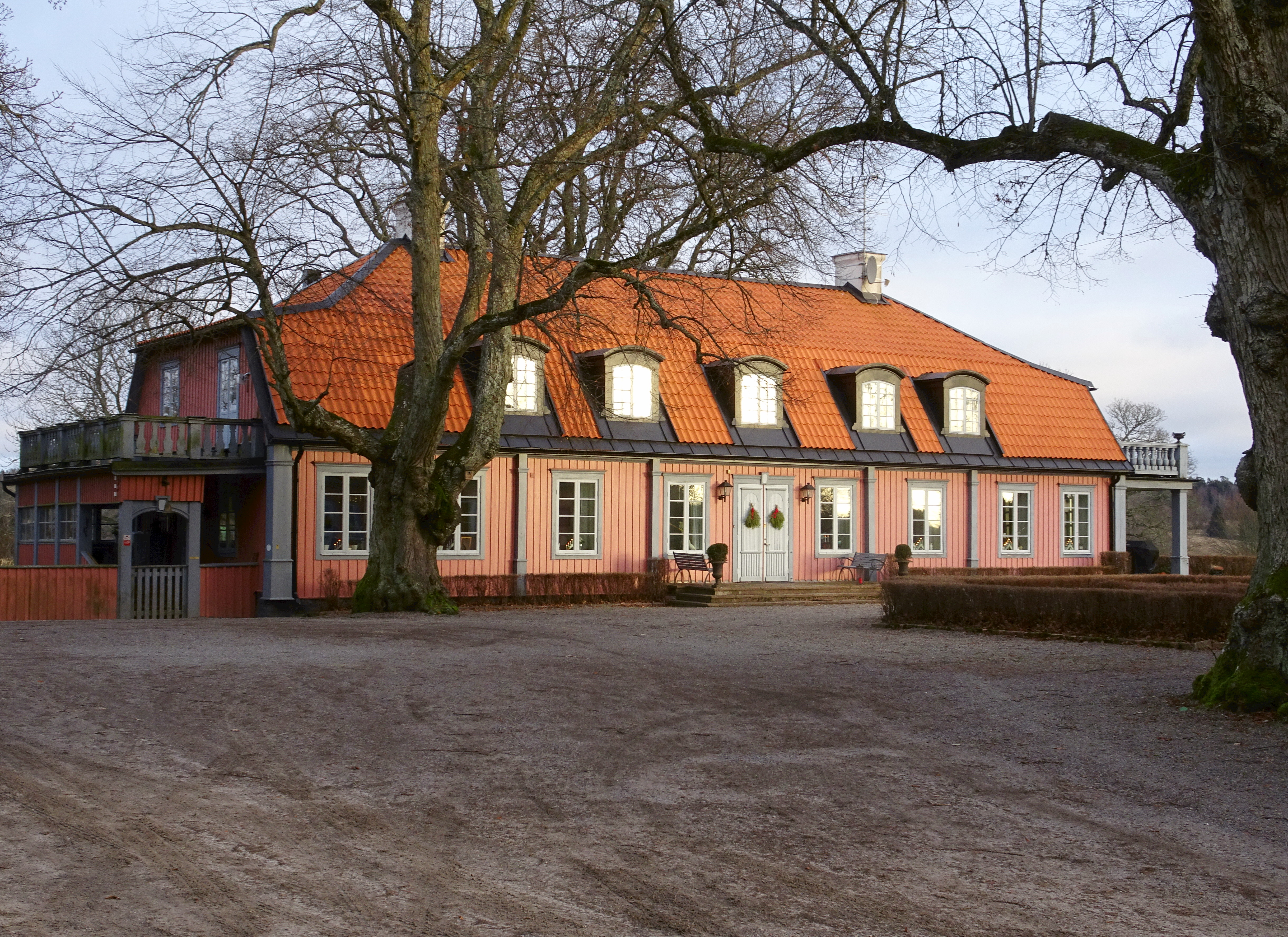 Marieberg Botkyrka kommun